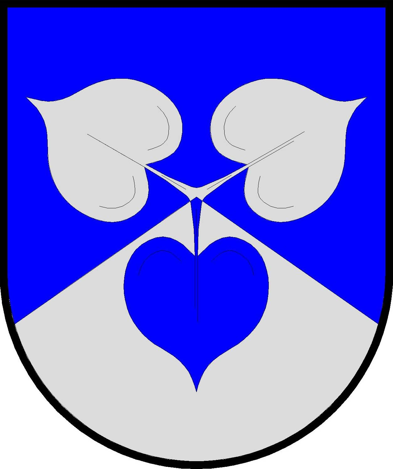 Znak obce Zvole (okres Praha-západ)